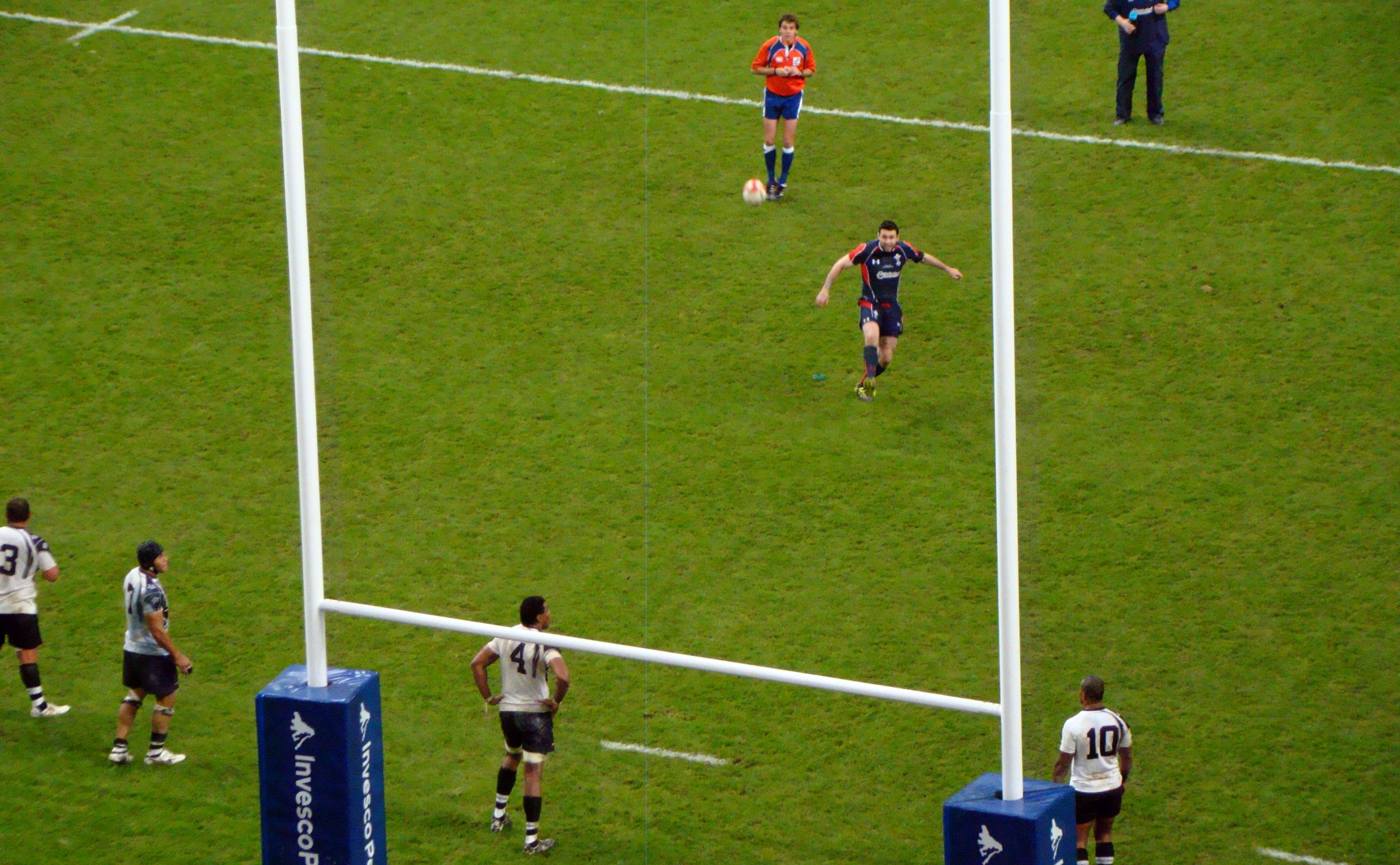 19/11/10 Wales v Fiji, Millennium Stadium, Cardiff, Wales